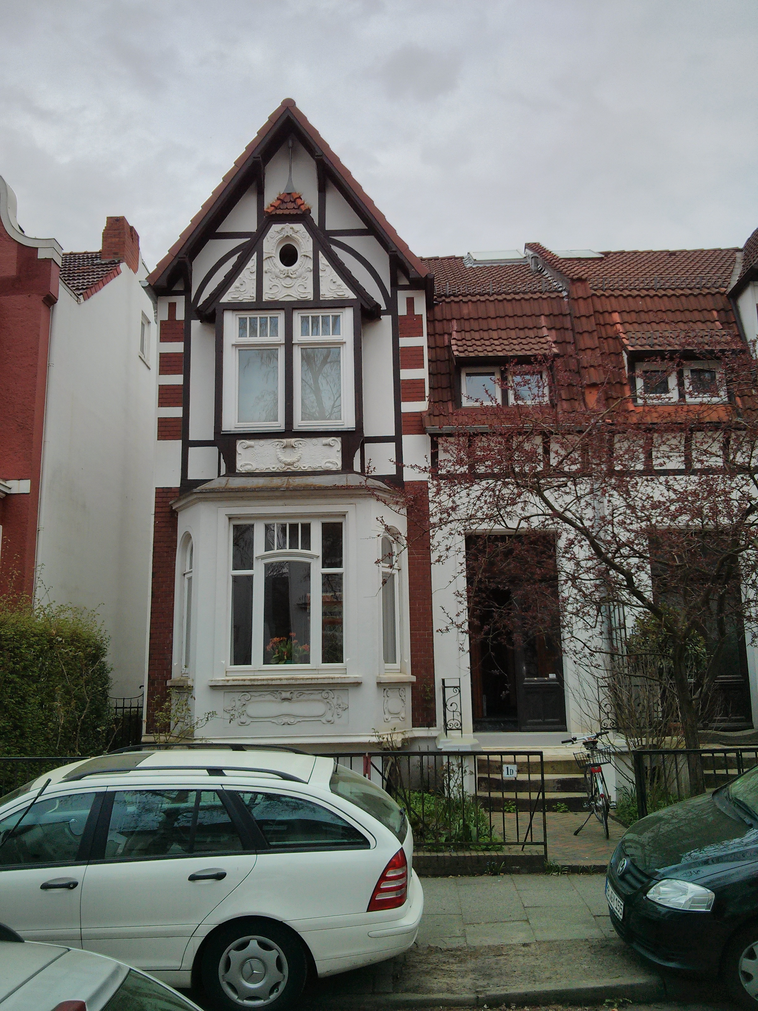 Wohnhaus in Bremen, Lortzingstraße 1D Das abgebildete Objekt ist ein geschütztes Kulturdenkmal in der Freien Hansestadt Bremen, mit der Nr. 0846 beim Landesamt für Denkmalpflege registriert.